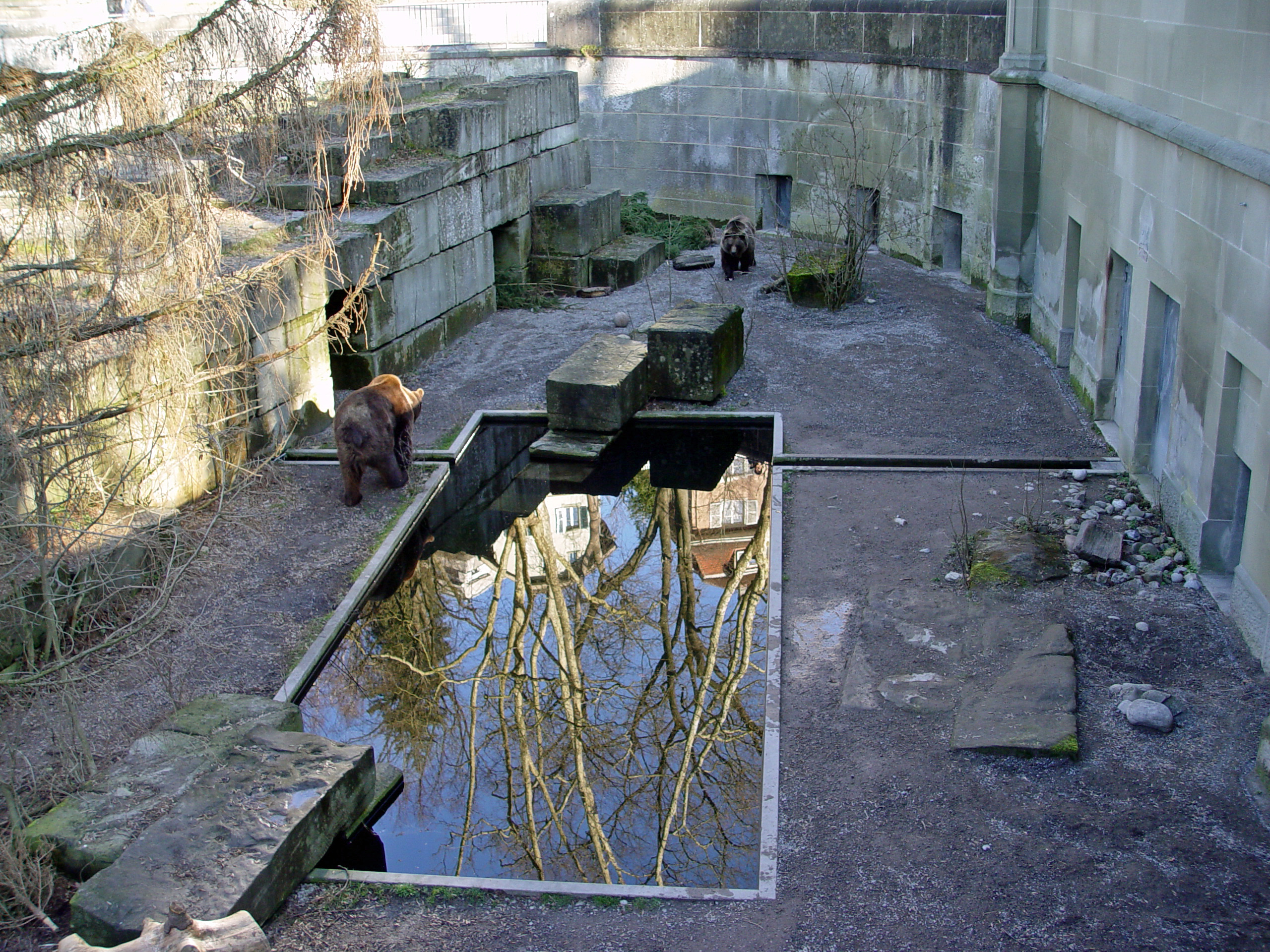 Braunbären (Ursus arctos) im Bärengraben in Bern, Tierpark Dählhölzli